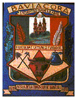 Escudo del municipio sonorense.